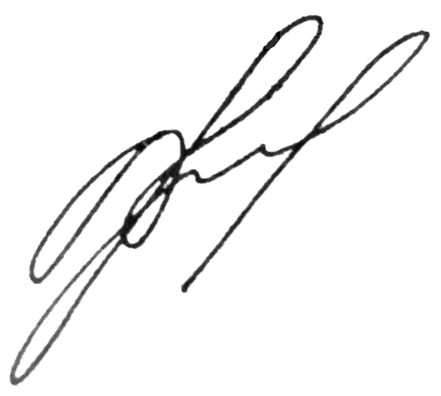 Автограф Владимира Анатольевича Яковлева. Фотосессия с первоклассниками в 1998 году